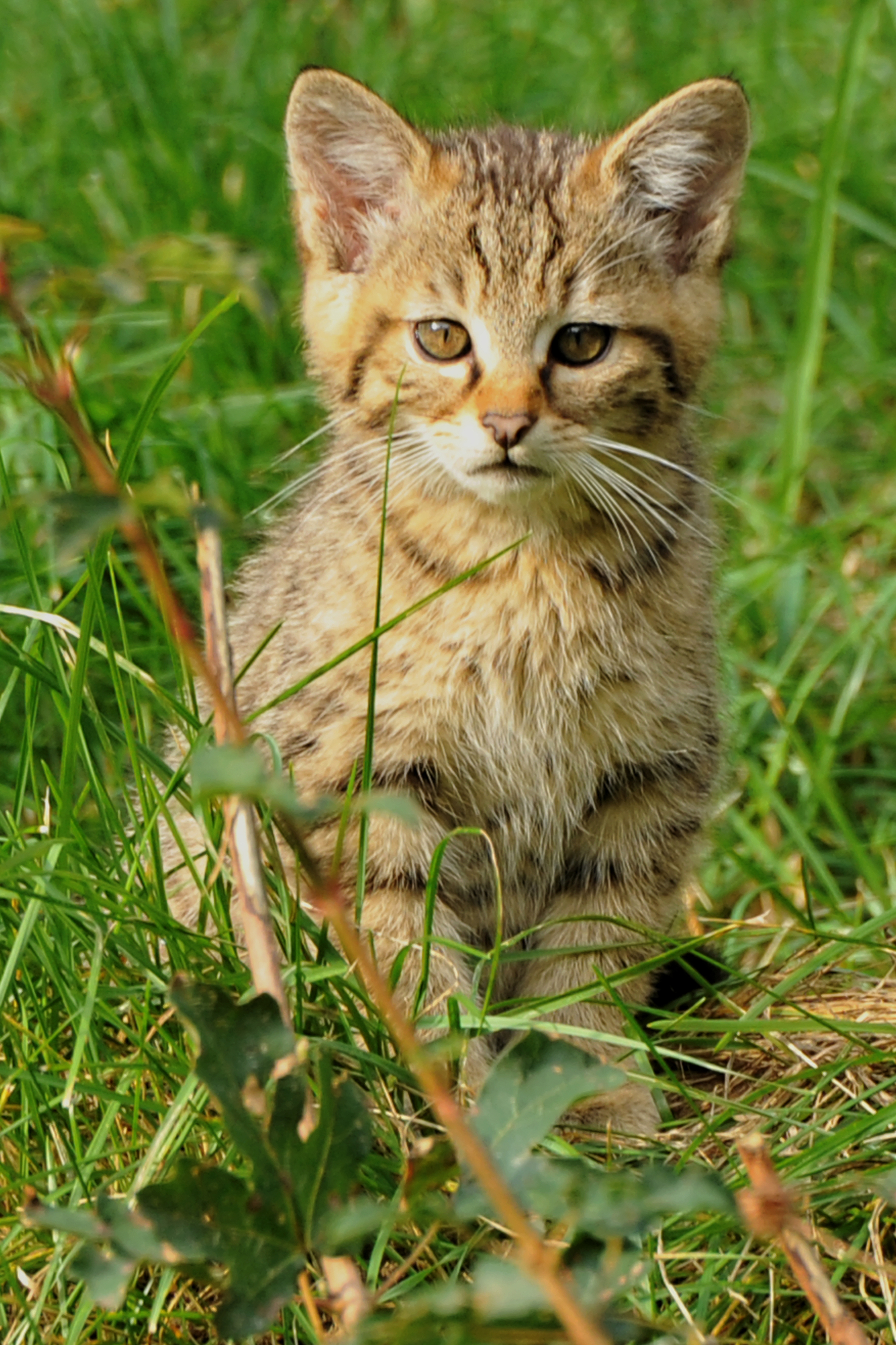 Ein guter Platz für wilde Tiere,der Wildpark in Bad Mergentheim.